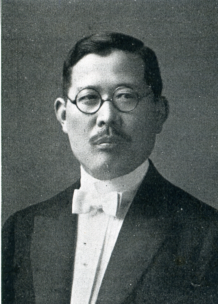 この写真は、鈴木安孝（1877-1955）の写真です。